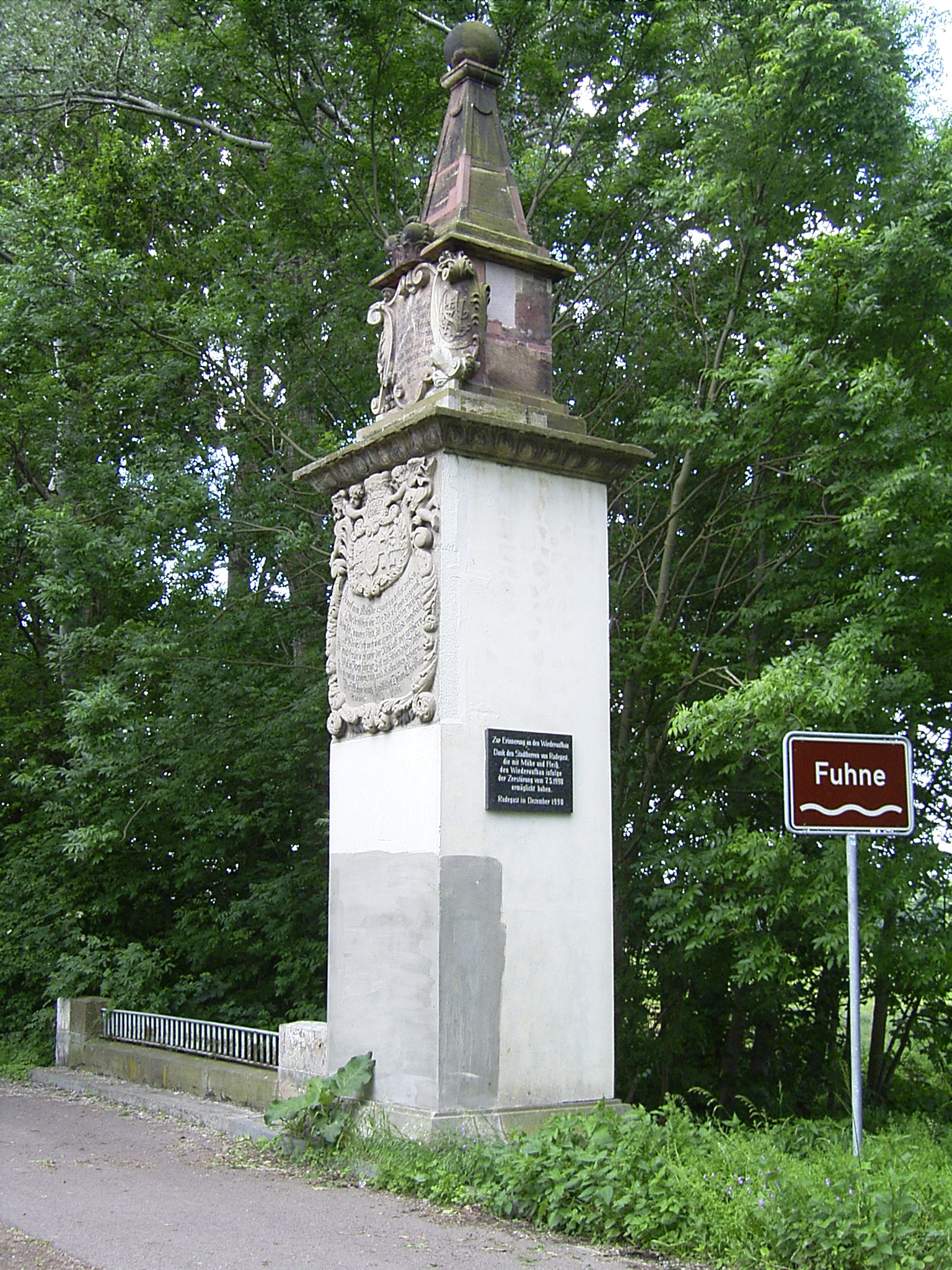 Denkmal Theurer Christian Radegast Anhalt